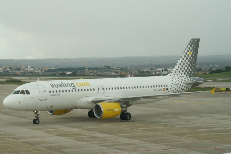 Vueling Airbus A320 EC-JGM at Palma de Mallorca (PMI)